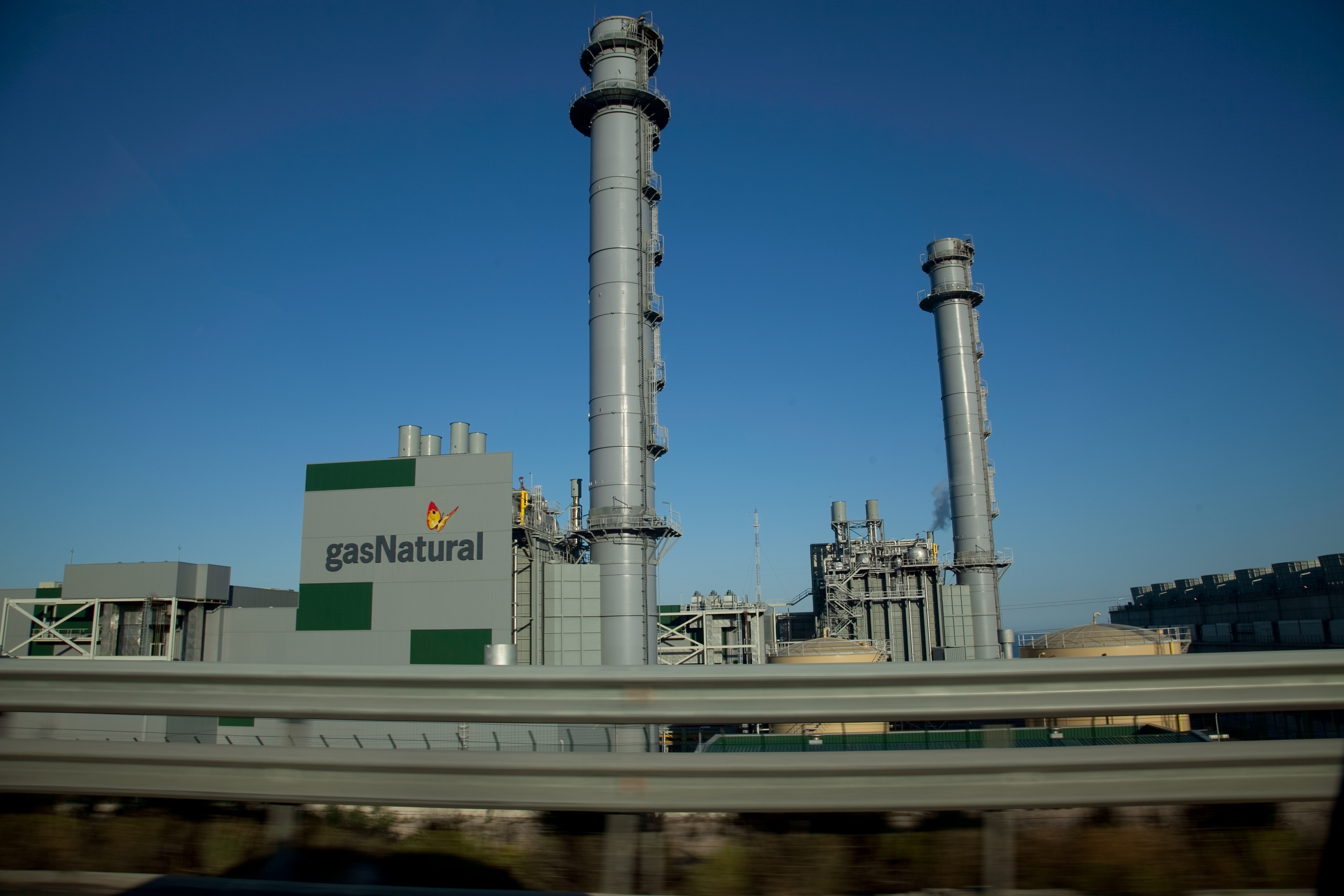 Instalaciones de Gas Natural. Central de ciclo combinado Plana del Vent en Vandellós, Tarragona (España) Cámara: Canon EOS 5D Mark II Objetivo: EF24-105mm f/4L IS USM Focal: 24 Exposición: ¹⁄₂₀₀ sec at f/10 Apertura: f/10 ISO: 100 Flash: no flash Autor: Kiko Alario